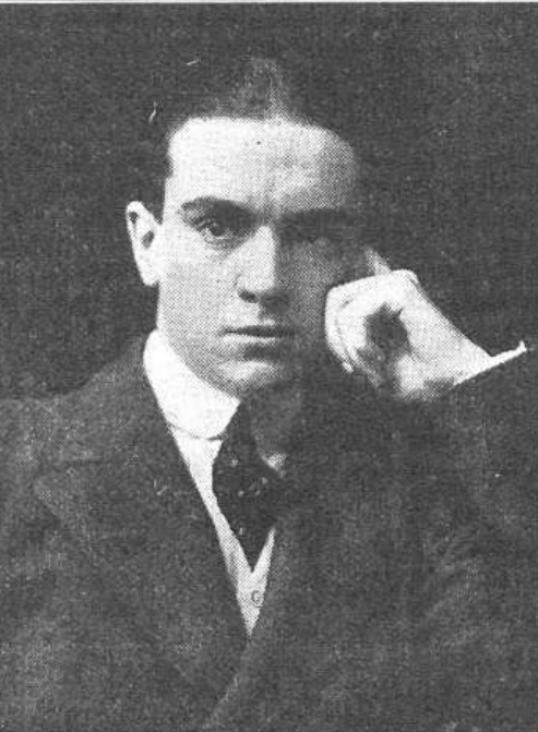 D. ALVARO ALCALA GALIANO. Notable literato, cuya interesante novela "El Príncipe Iván", recientemente publicada, está obteniendo un notable éxito. FRANZEN